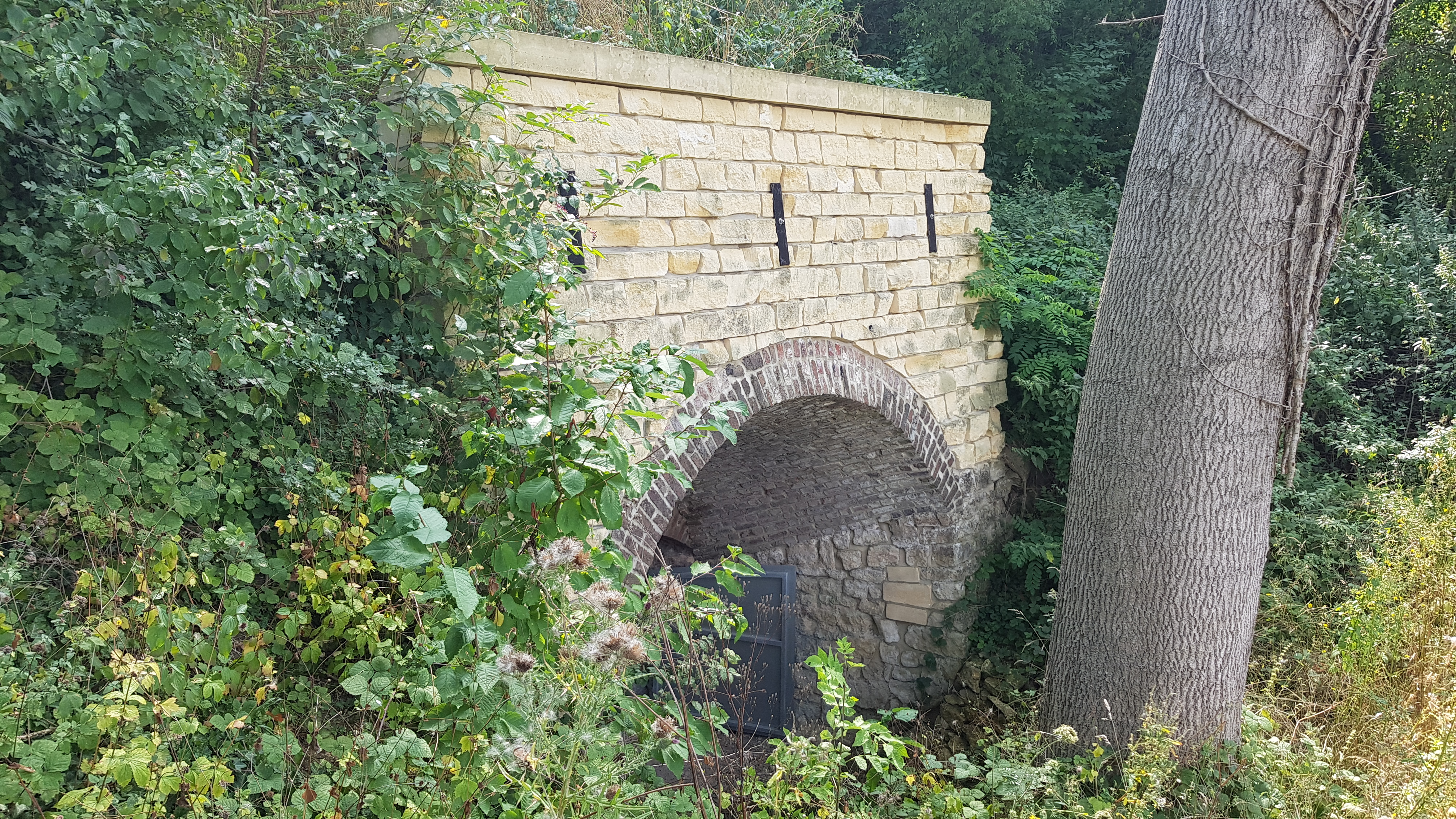 Kalkoven Walem, Walem, Valkenburg aan de Geul, Nederland